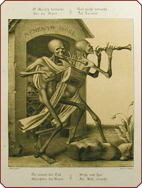 Dodendans